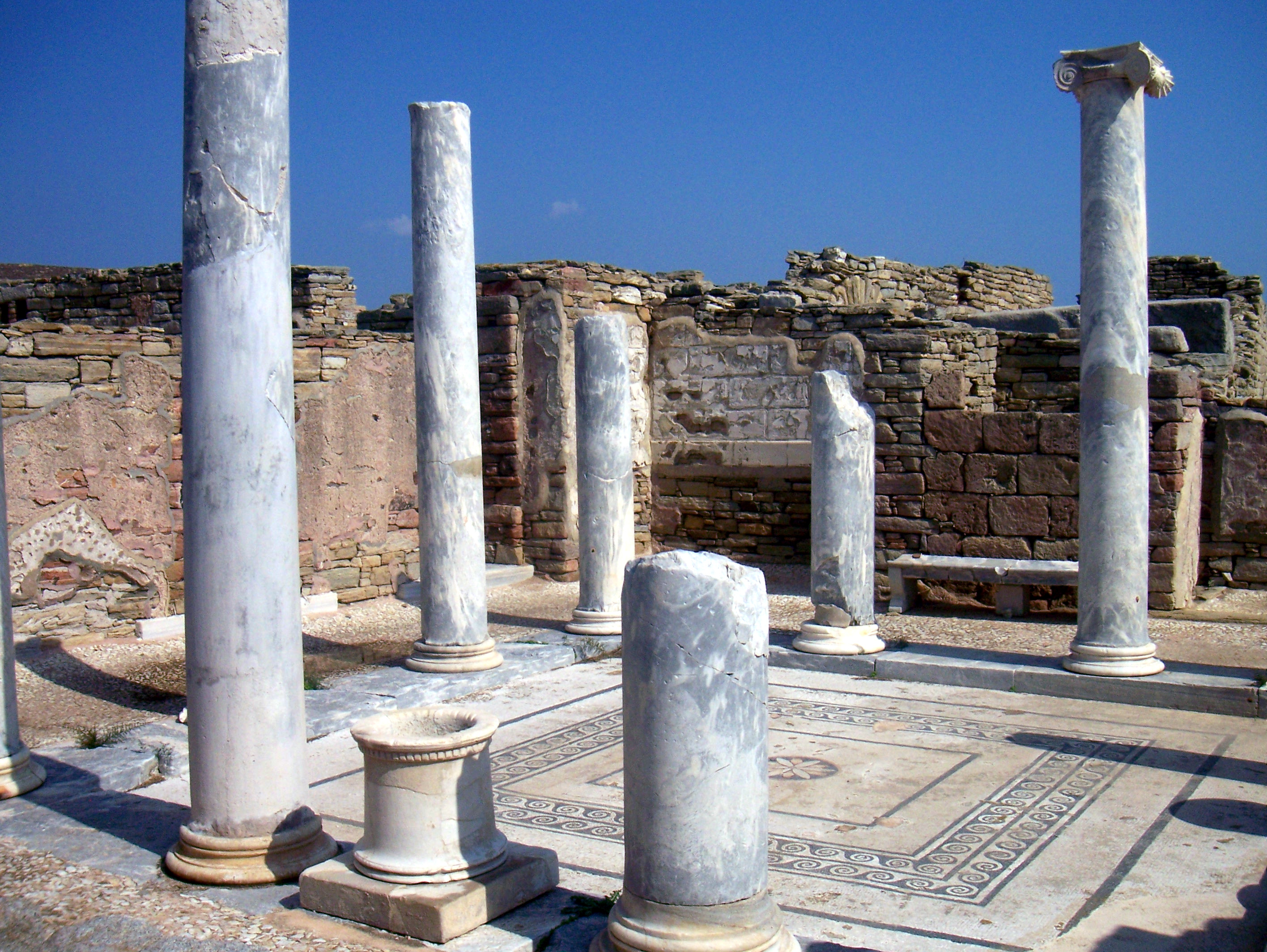 Ruinas de la antigua ciudad griega de Delos, en la isla homónima, que forma parte del archipíelago de las Cícladas, en el Mar Egeo (Grecia).Ancient Delos